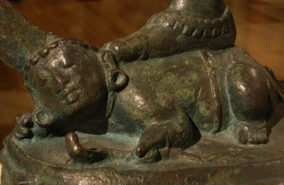 Apasmara: zwergenhafter Dämon des Hinduismus.